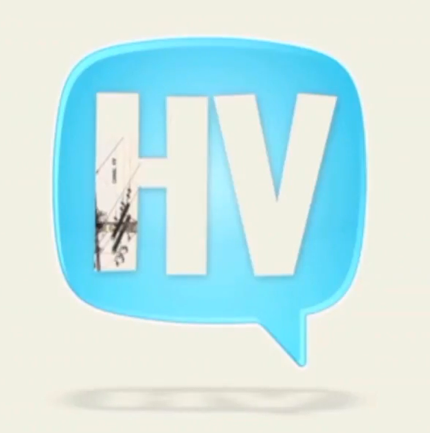 Logotipo de Canal HV